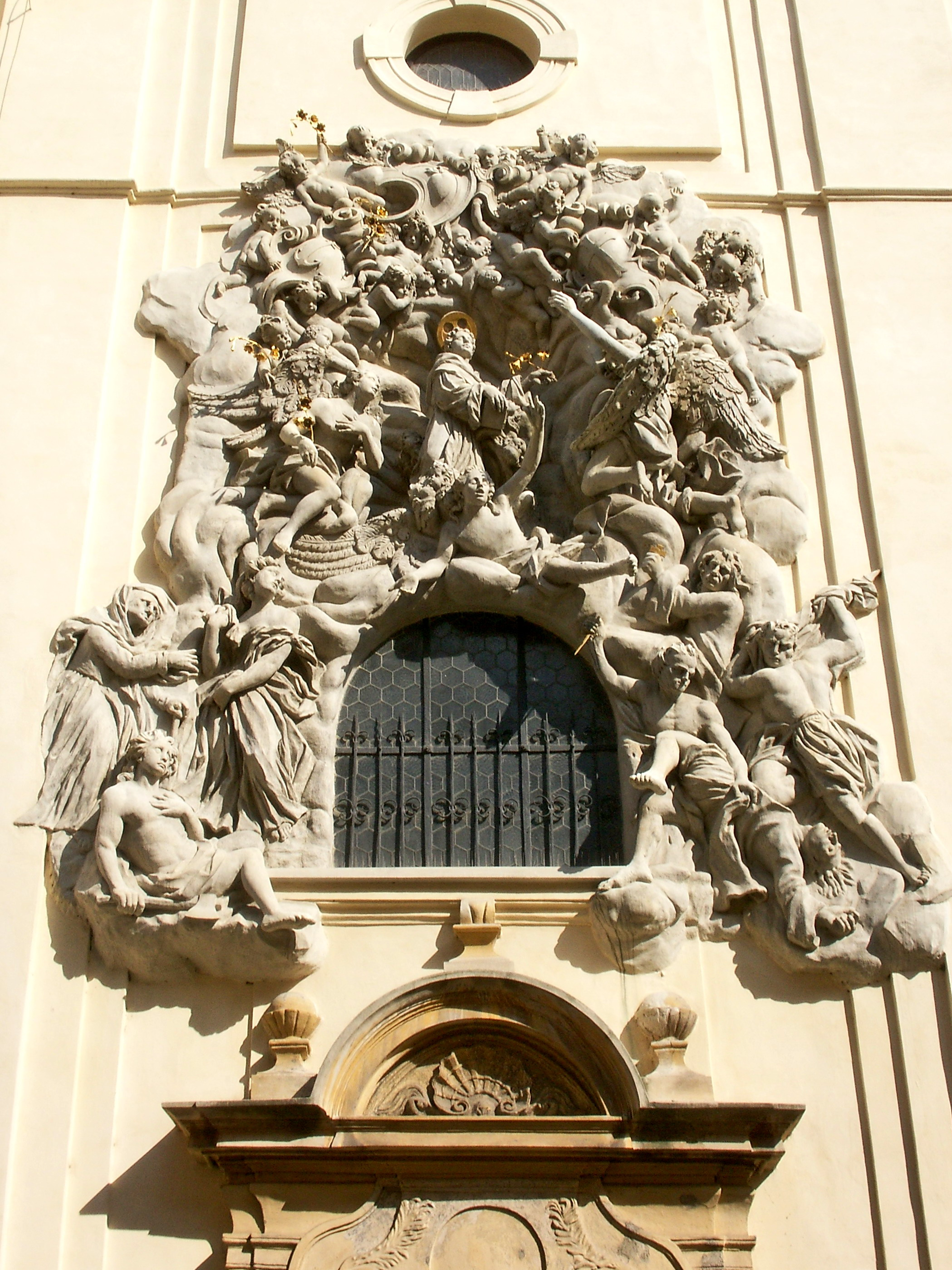 Štuk nad vchodem do kostela sv. Jakuba Většího (Praha, Staré Město)